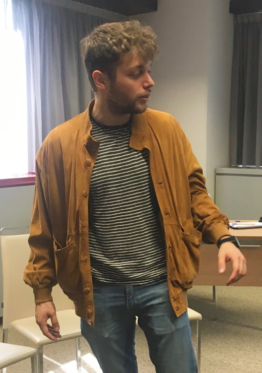 Ludovico durante un evento con i fan di Skam Italia.